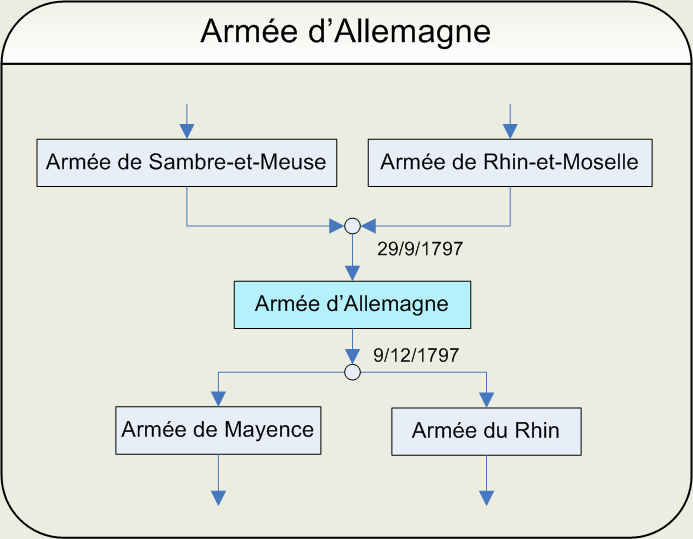 Ordinogramme de l'armée d'Allemagne Dessin réalisé par Papier K